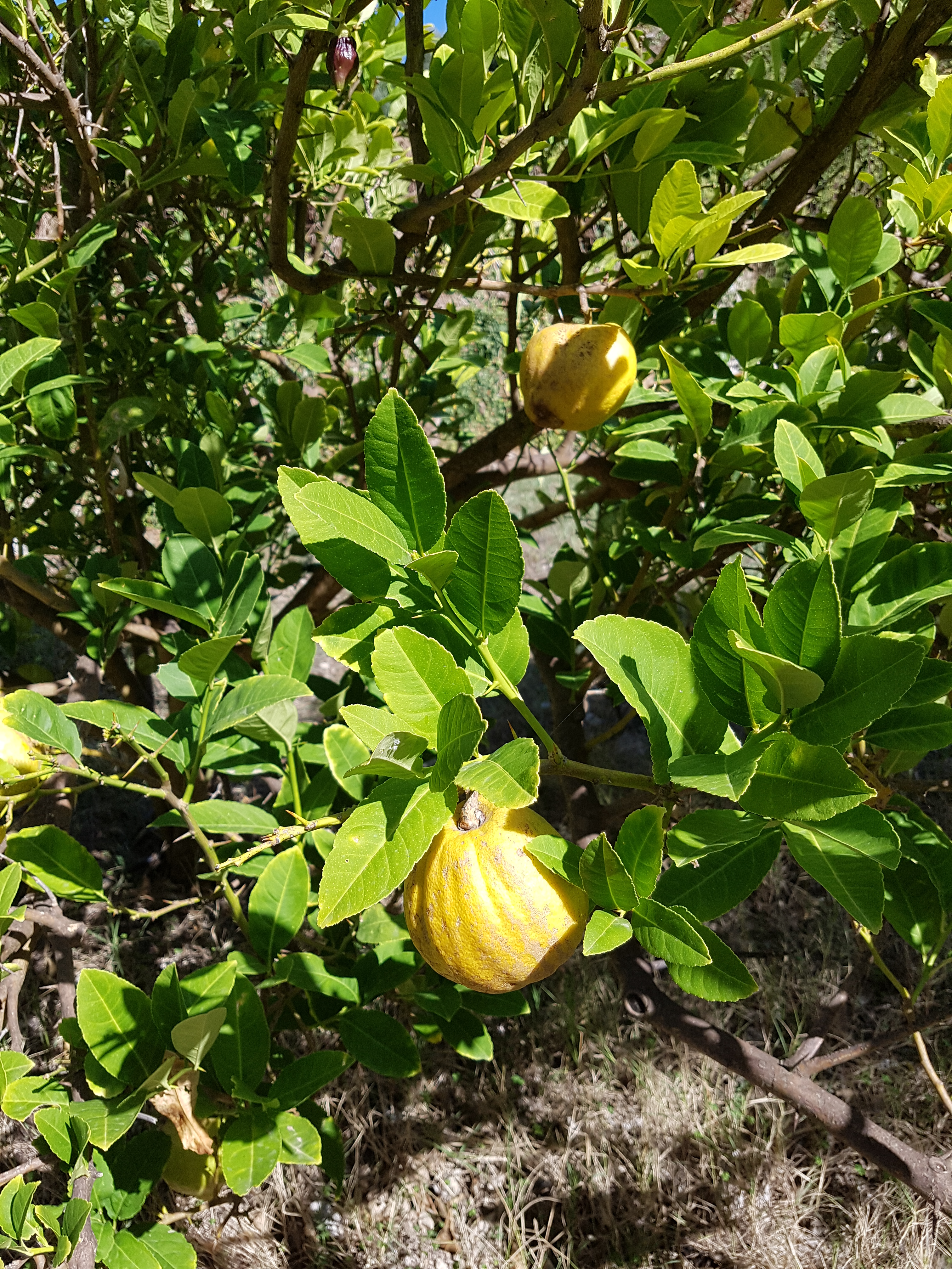 Κιτριά με καρπούς. Κρασούνας Μυλοποτάμου.